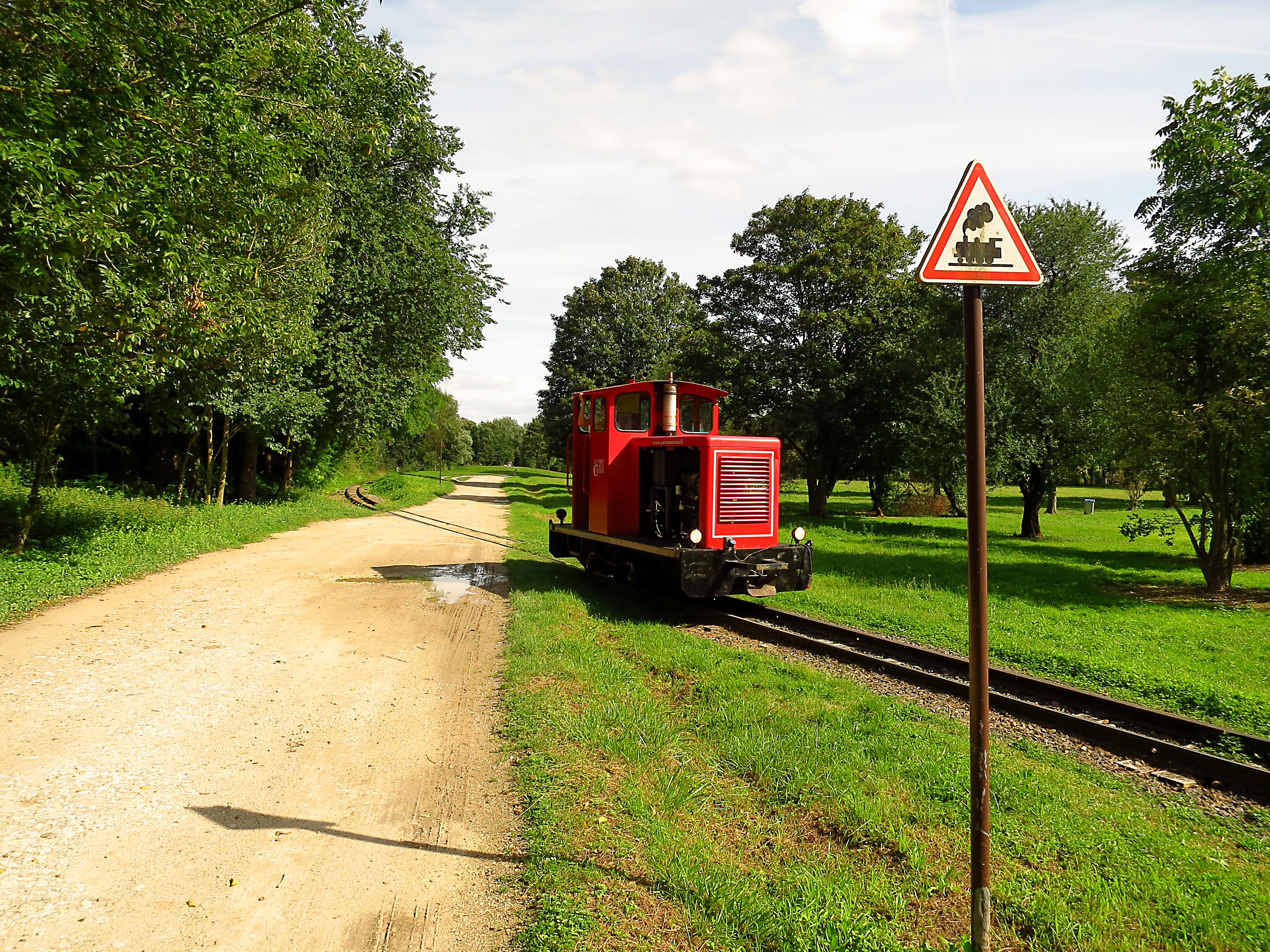 Draveil (Essonne, Île-de-France, France) - La locomotive du Petit Train du Port aux Cerises.